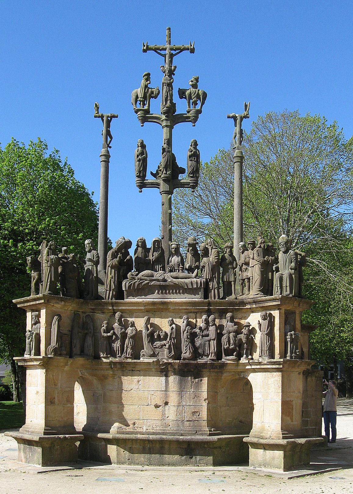 Plougastel-Daoulas, Finistere, Bretagne